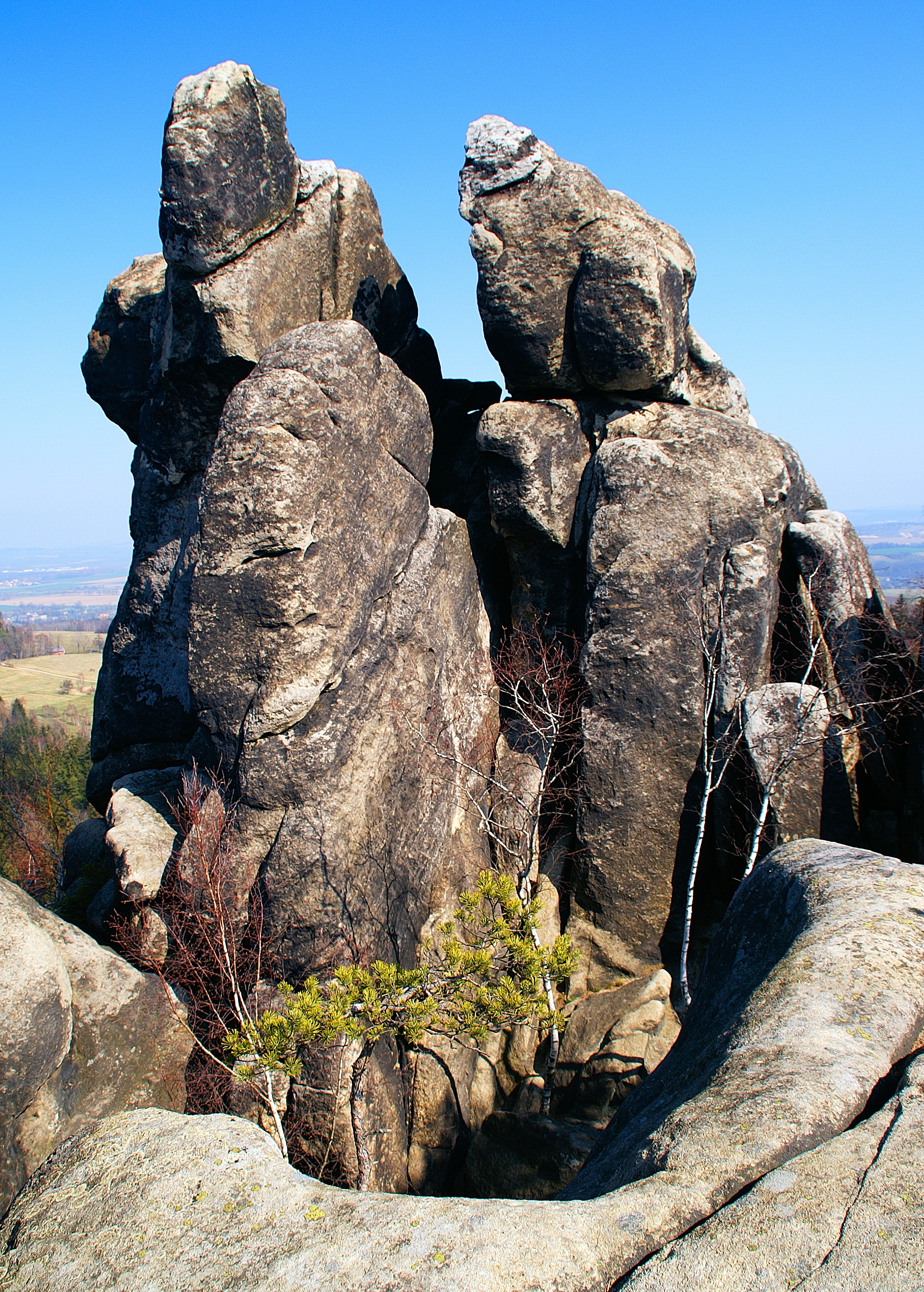 Vraní skály